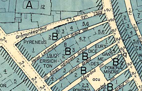 Del av Stadsplan över Gamla stan, visande kvarteren Pyeneus, Erisichton, Eurydice